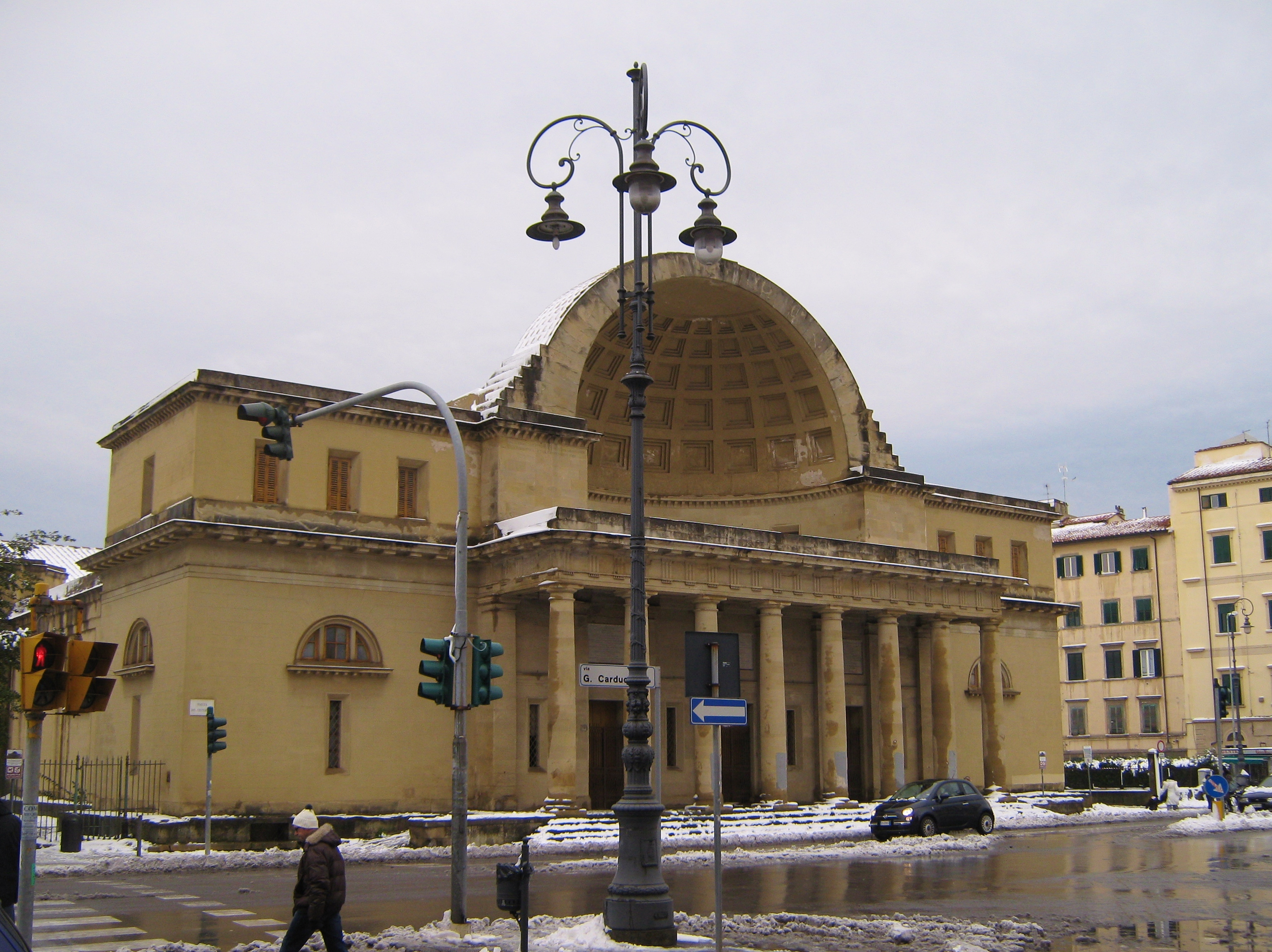 Livorno, il Cisternone durante la nevicata del 31 gennaio - 1° febbraio 2012.